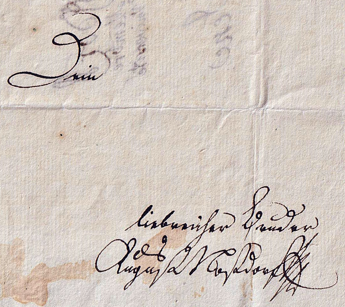 Unterschrift des Revolutionärs August Moßdorff (1758-1843), von Brief an den Bruder, 1777. Museum im Alten Rathaus Grünstadt.